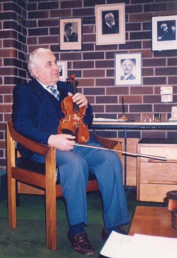 Jan Sedivka in his Mount Nelson violin studio, 1988